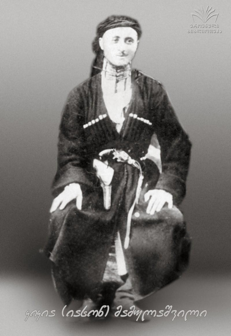 კიკია (იასონ) მამულაიშვილი